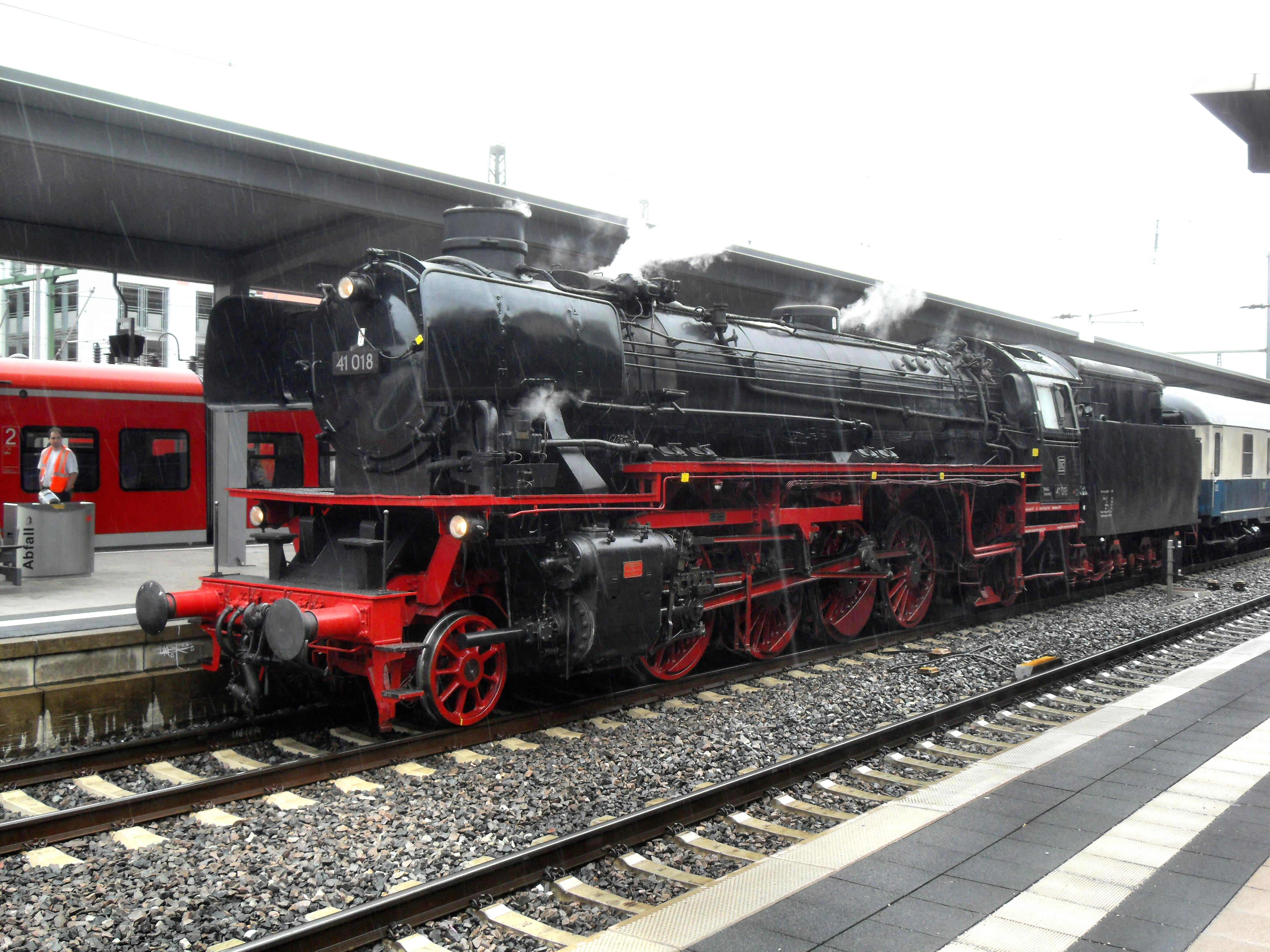 Dampflokomotive der DB Baureihe 41 (41 018) im Wormser Hauptbahnhof in Rheinland-Pfalz (Deutschland)